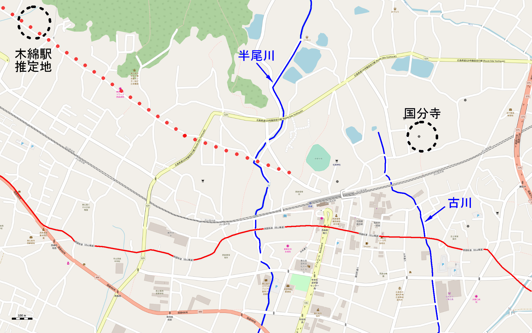 2018年の東広島市西条地区周辺地図に古代・中世・近世山陽道を図示したもの This map may be incomplete, and may contain errors. Don't rely solely on it for navigation.